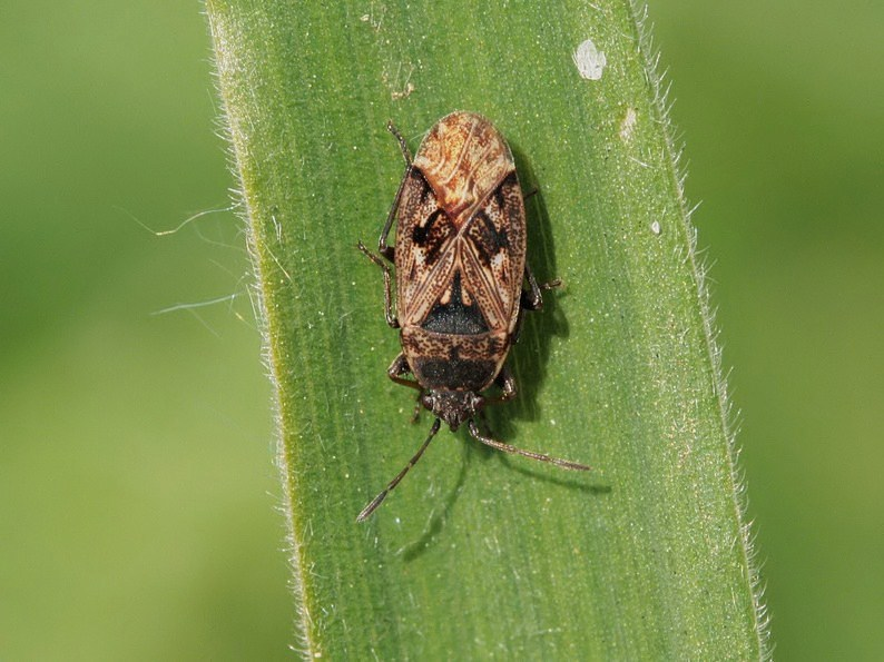 Sphragisticus nebulosus